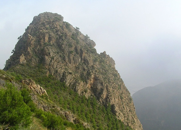 vista sureste